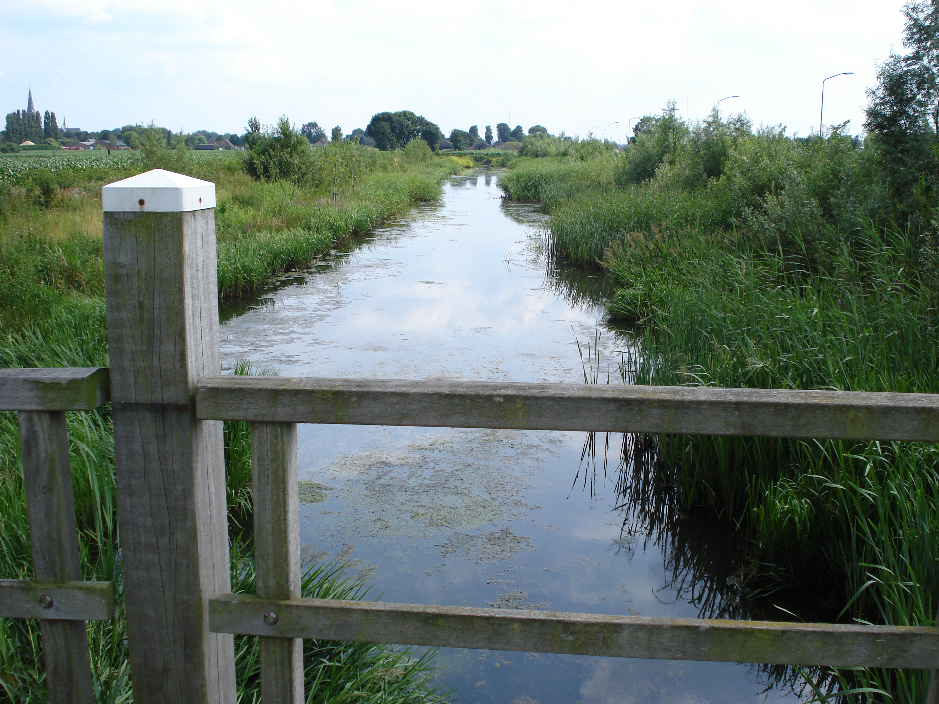 Berghem, une wetering (canal de drainage), au fond l'église